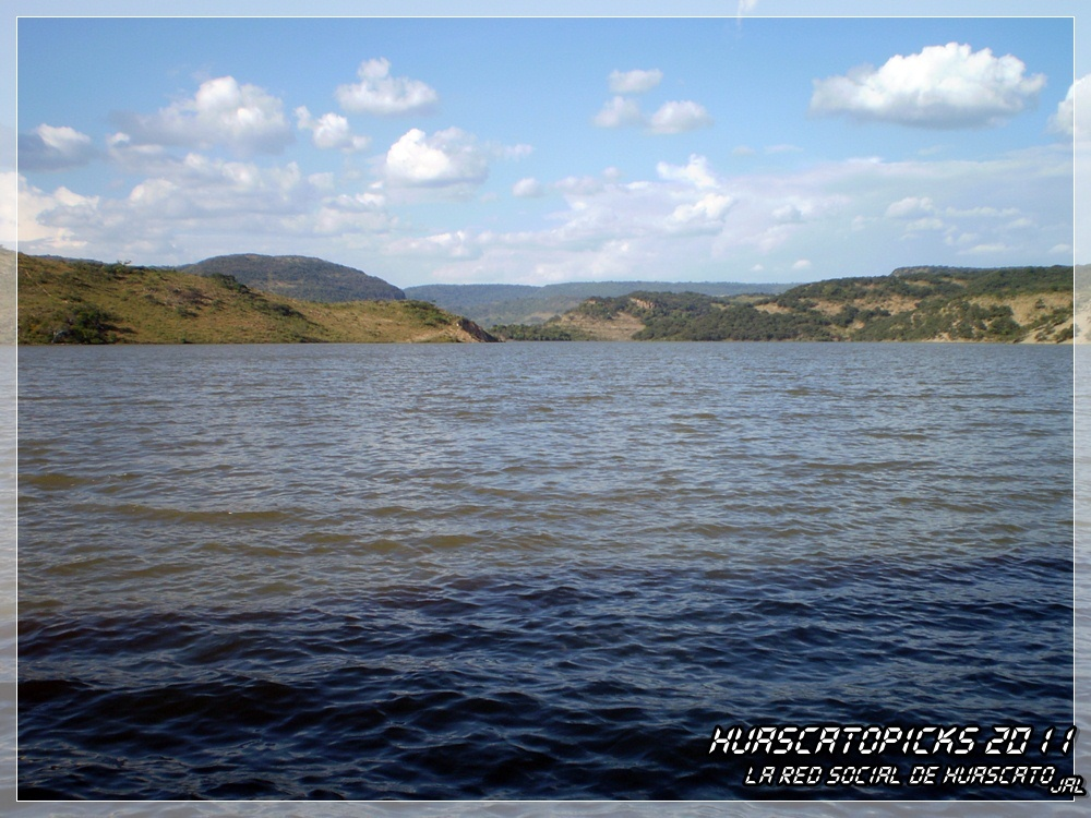 PRESA DE HUASCATO This image contains digital watermarking or credits in the image itself. The usage of visible watermarks is discouraged. If a non-watermarked version of the image is available, please upload it under the same file name and then remove this template. Ensure that removed information is present in the image description page and replace this template with metadata from image or attribution metadata from licensed image . Caution: Before removing a watermark from a copyrighted image, please read the WMF's analysis of the legal ramifications of doing so, as well as Commons' proposed policy regarding watermarks. If the old version is still useful, for example if removing the watermark damages the image significantly, upload the new version under a different title so that both can be used. After uploading the non-watermarked version, replace this template with superseded|new filename|version without watermarks .